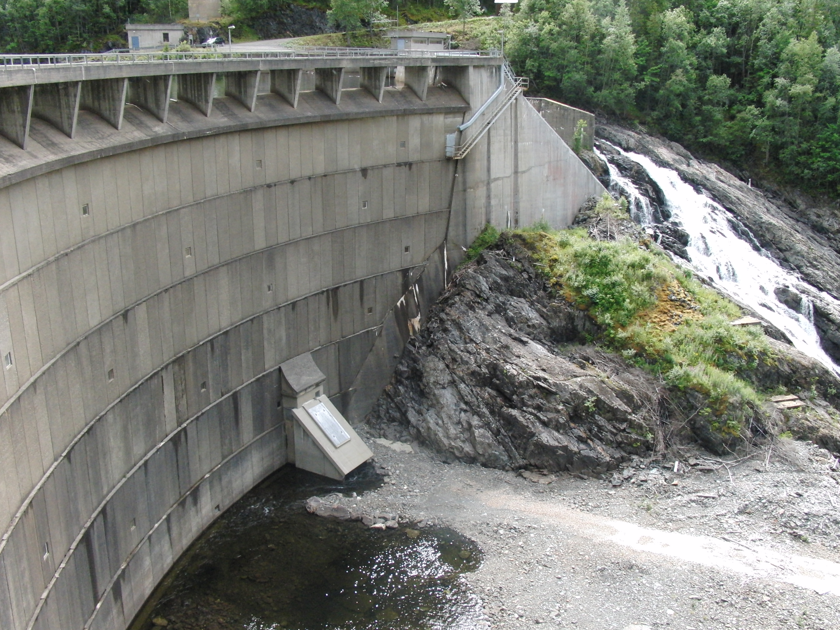 Hegsetdammen kraftverk